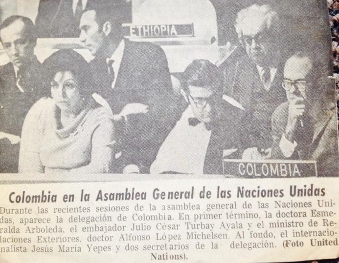 Recorte de periódico. Foto ONU. En la foto: La doctora Esmeralda Arboleda, el embajador Julio Cesar Turbay Ayala y el ministro de la relaciones exteriores, doctor Alfonso López Michelsen. Al fondo el internacionalista Jesús Maria Yepes, el Dr. Ernesto Vela Angulo y otro secretario de la delegación